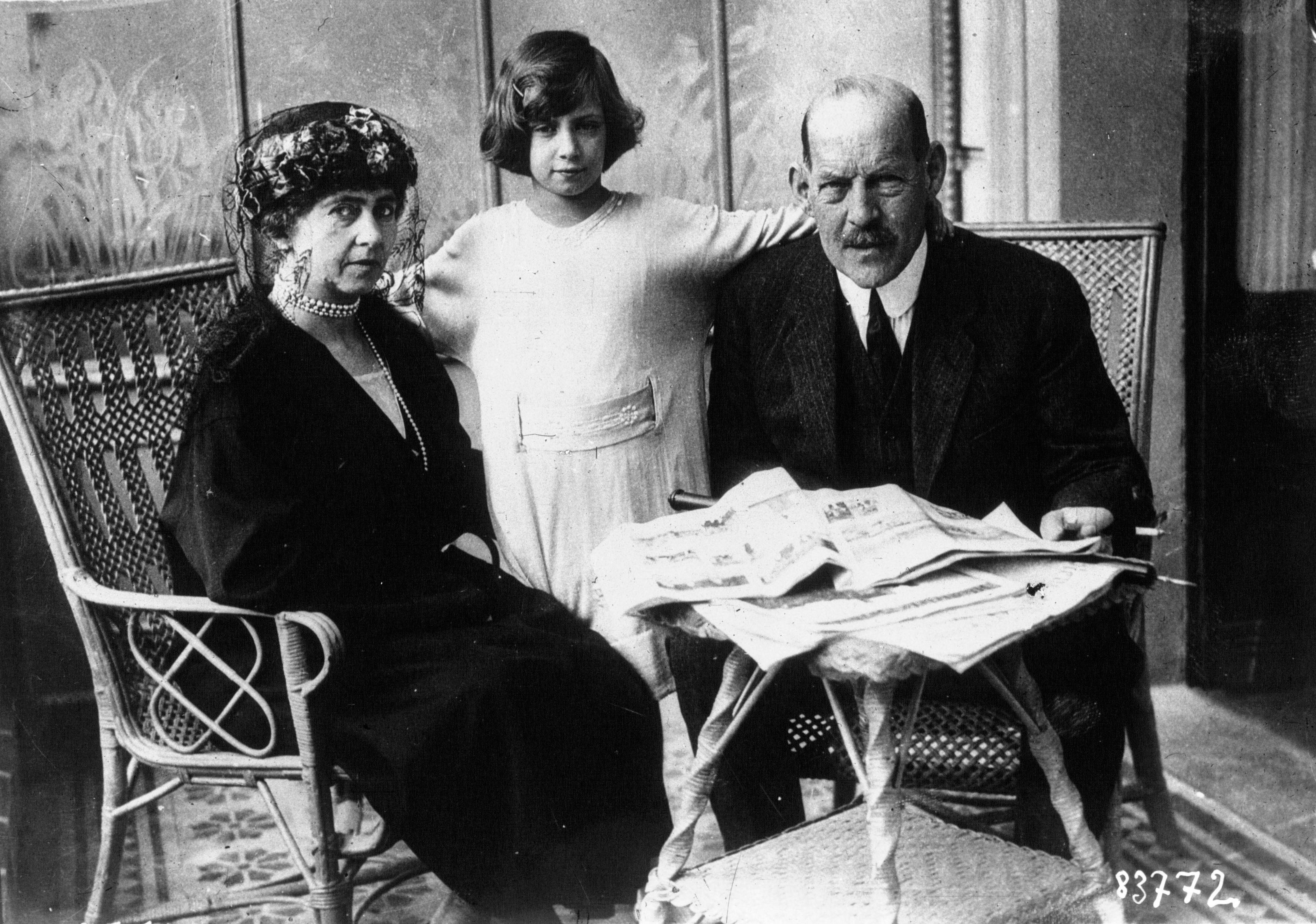 Constantino I de Grecia y su familia en 1920.